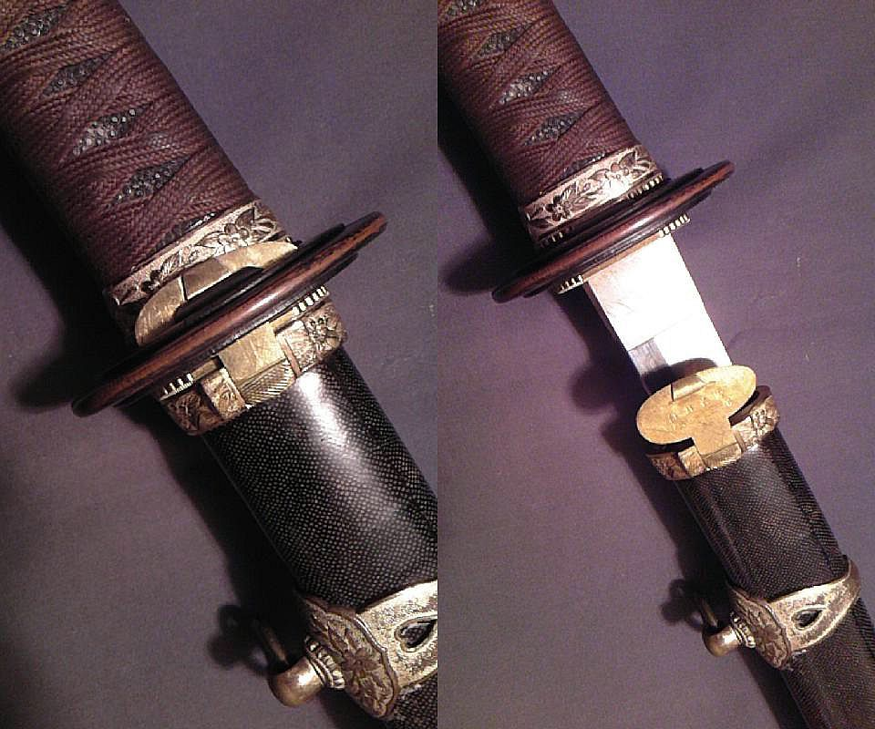 特許一三二一０六号 〔昭和十四年公告第二四五九号〕 第四十二類 四、刀剣 出願 昭和十二年六月二十一日 公告 昭和十四年五月三十日 特許 昭和十四年九月十三日 特許権者（発明者） 飯田国太郎 代理人 弁理士 谷山謙雄 外二名